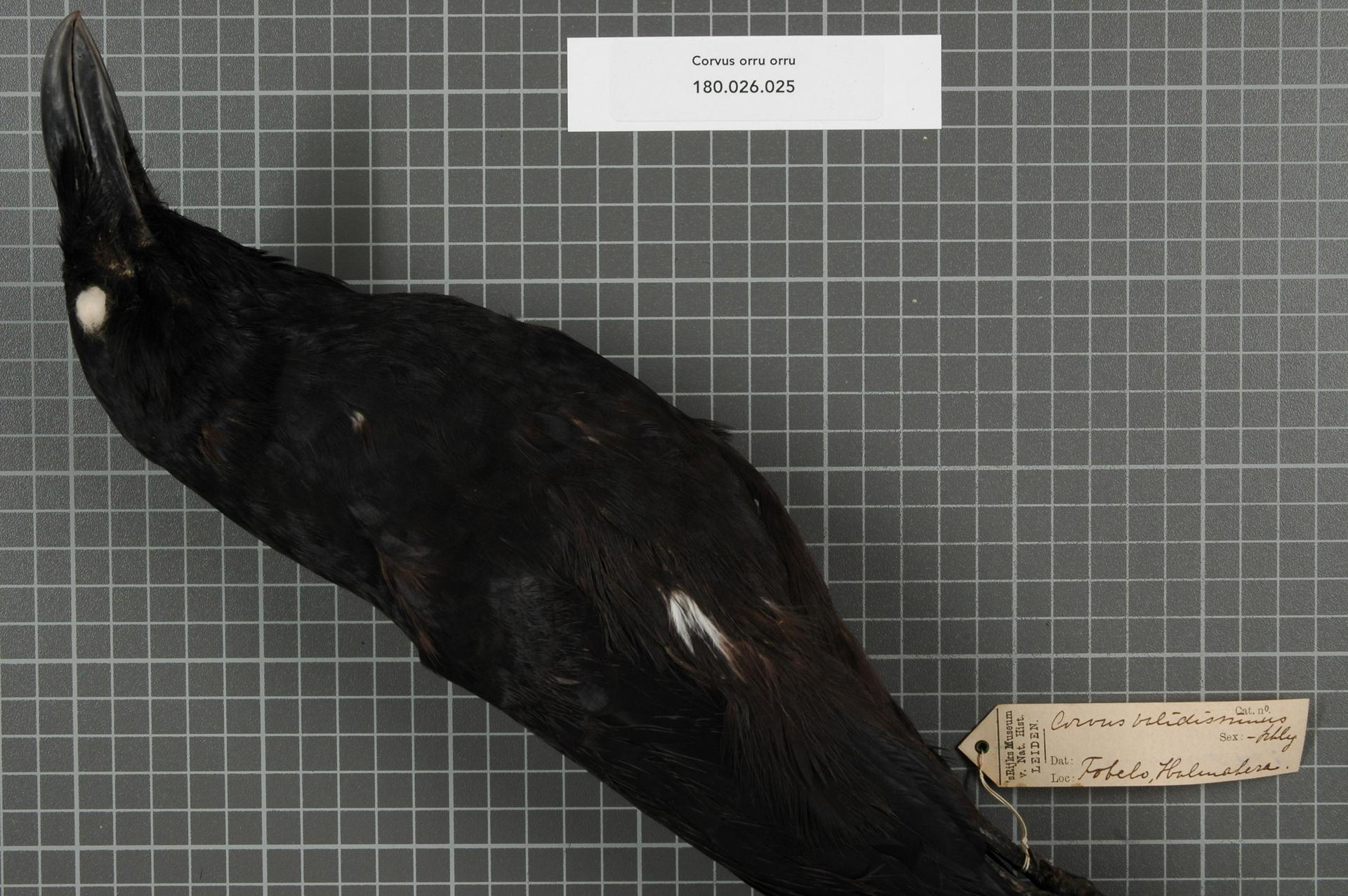 Corvus orru orru Bonaparte, 1851